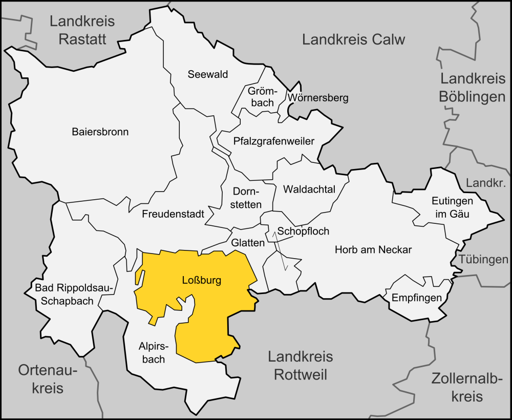 Karte der Gemeinde Loßburg im Landkreises Freudenstadt